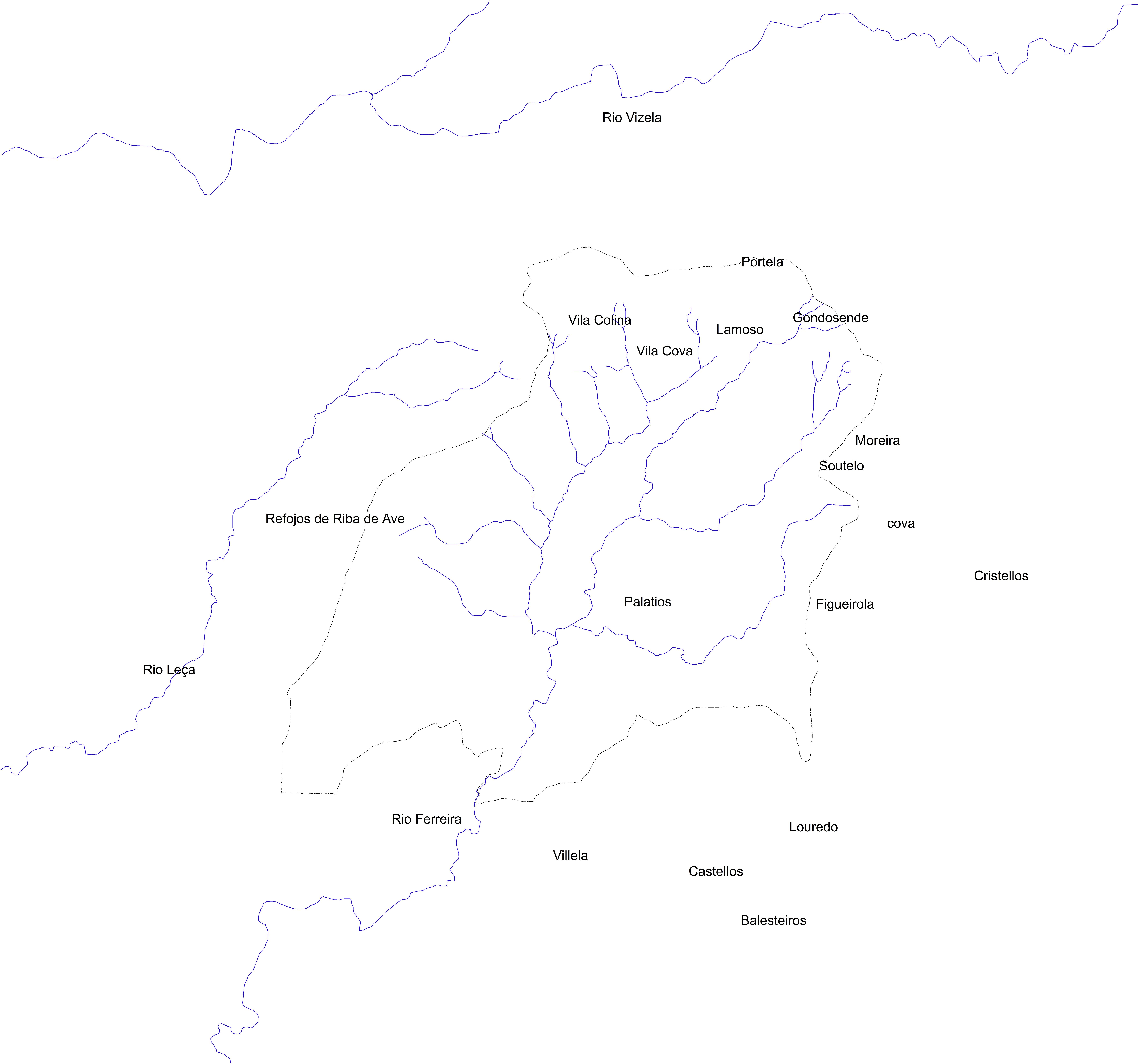 Topónimos e Igrejas referidas no livro de Mumadona Dias